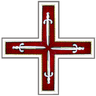 Cruz del Real Estamento Militar del Principado de Gerona, cuerpo nobiliario español.